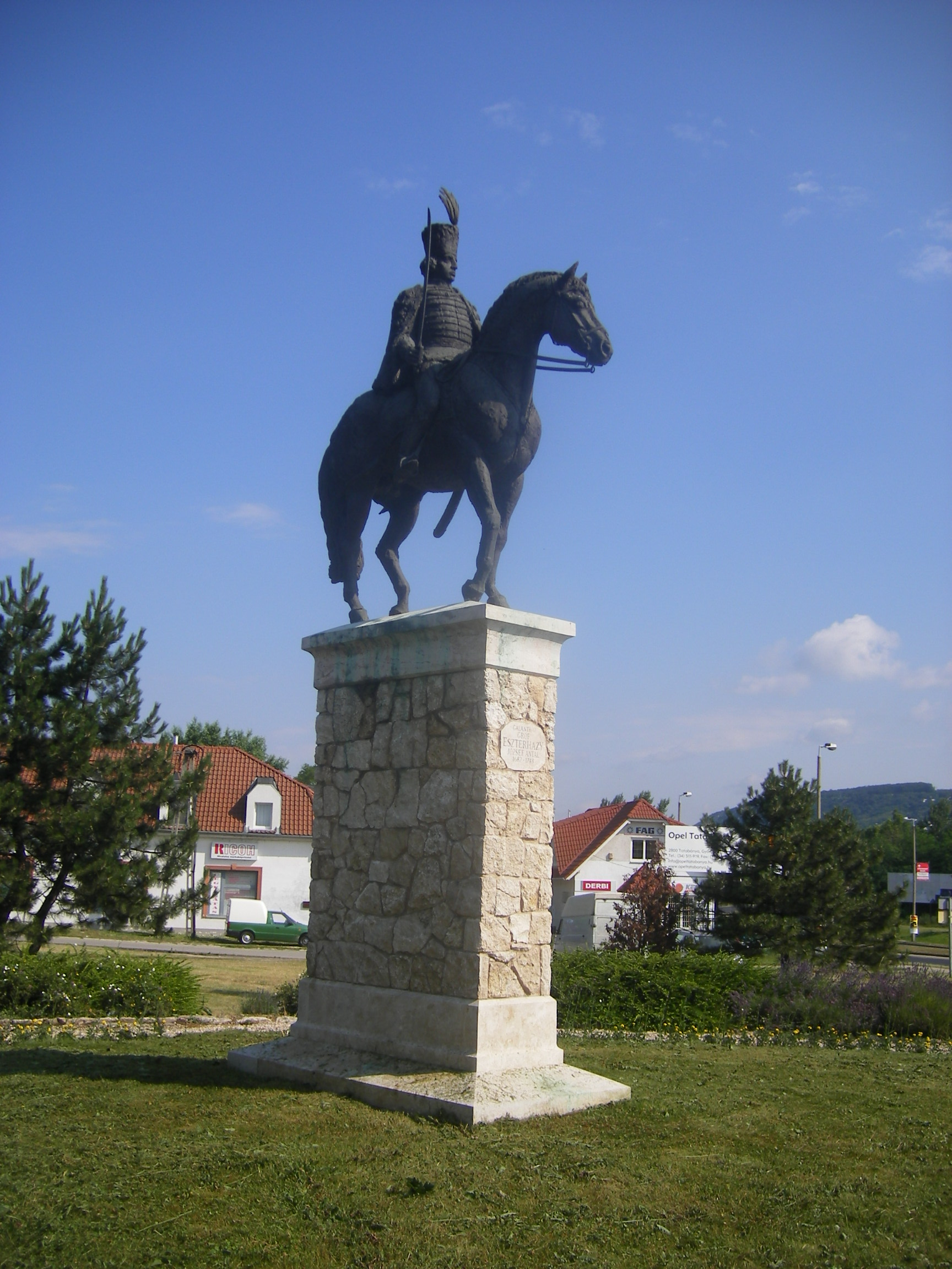 Bánhida - Esterházy József lovasszobra